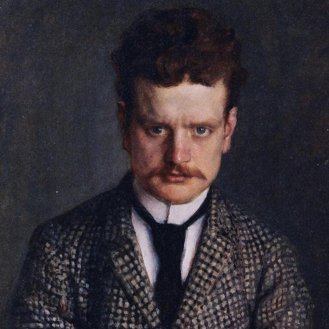 Eero Järnefeltin maalaama muotokuva langostaan, säveltäjä Jean Sibeliuksesta. Teos kuuluu yksityiskokoelmaan.